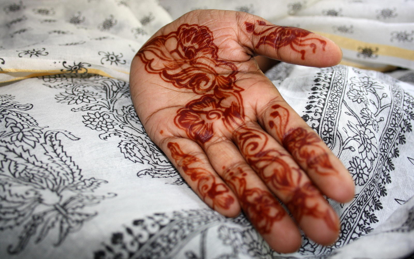 മൈലാഞ്ചി കൈയ്യ്